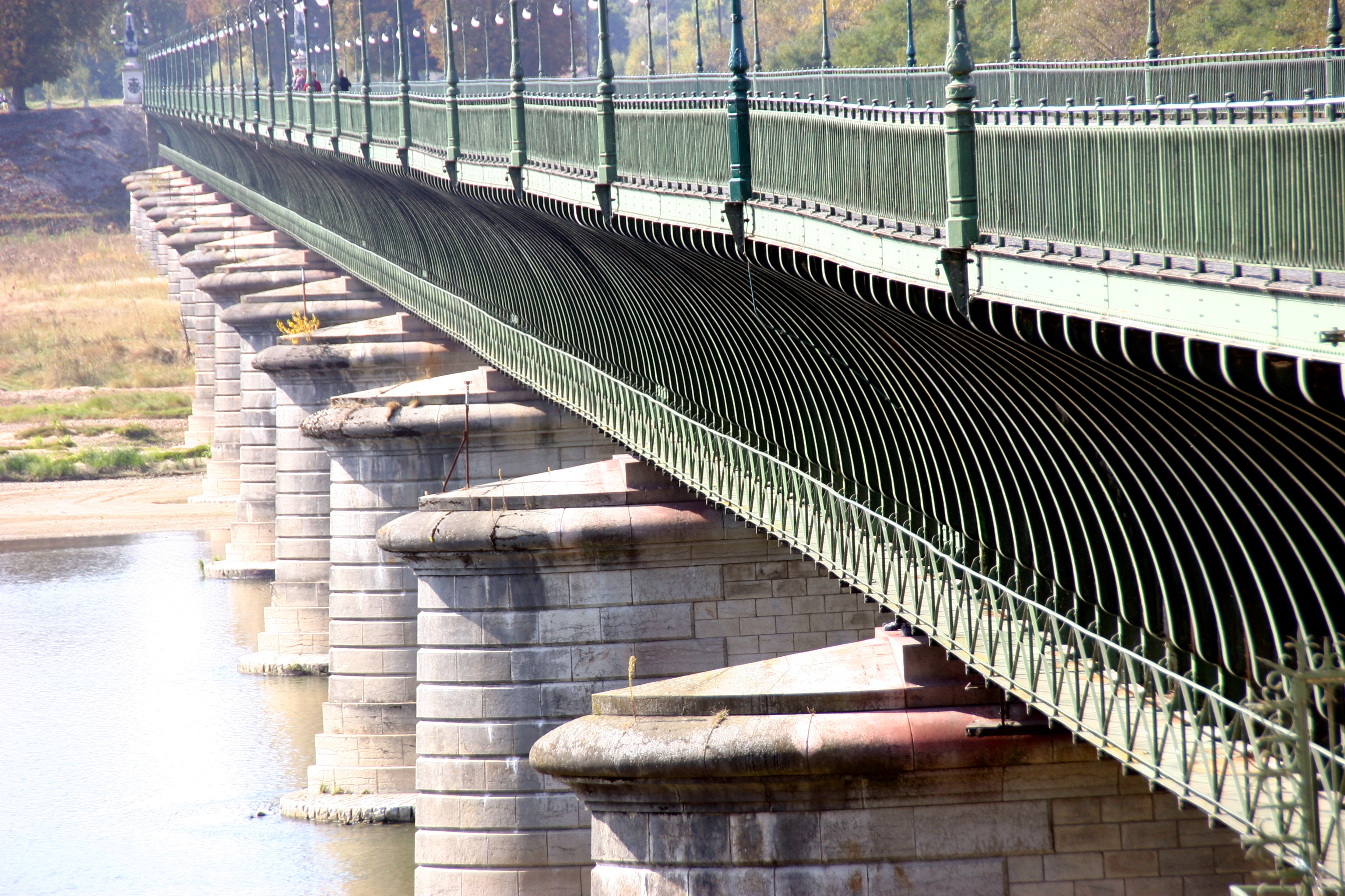 Kanalbrücke Briare; auf ihr quert der Canal latéral à la Loire den tiefer gelegenen Fluss Loire.